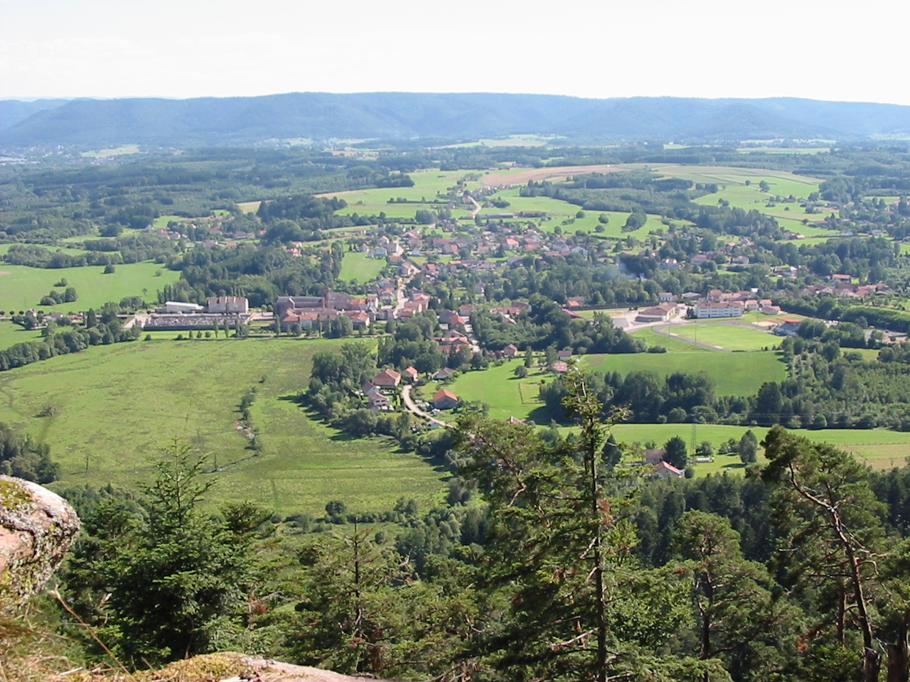 Étival-Clairefontaine, commune des Vosges. Prise de vue depuis la Pierre d'Appel.